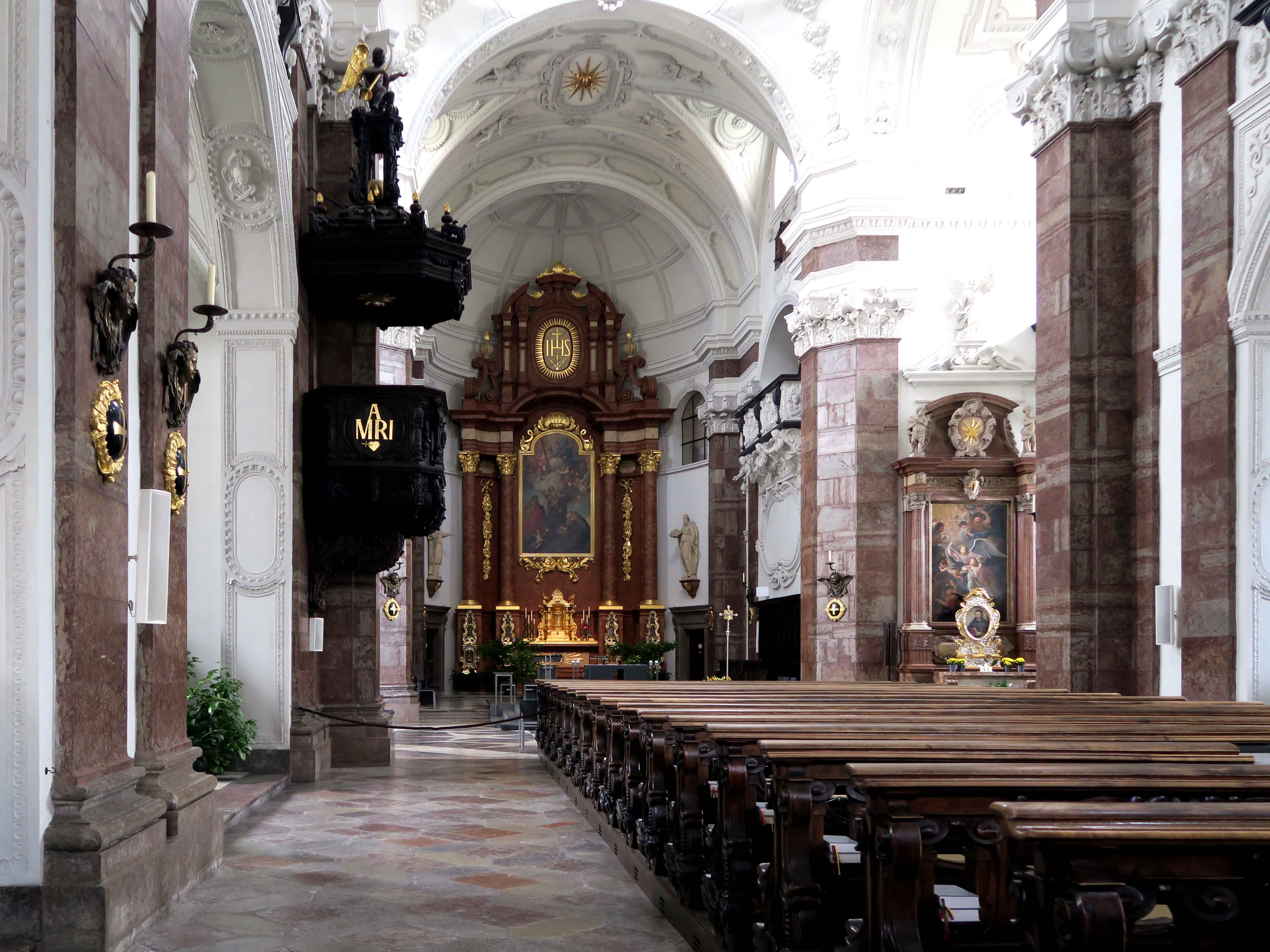 Kirchenraum innen maximale Totale mit Weitwinkel